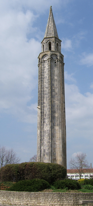 Lanterne des morts à Saint-Pierre-d'Oléron, île d'Oléron, Charente-Maritime, France. Élevée au XIIe siècle, elle est classée monument historique depuis 1886. Avec ses 23 m de haut, c’est la plus grande de France.